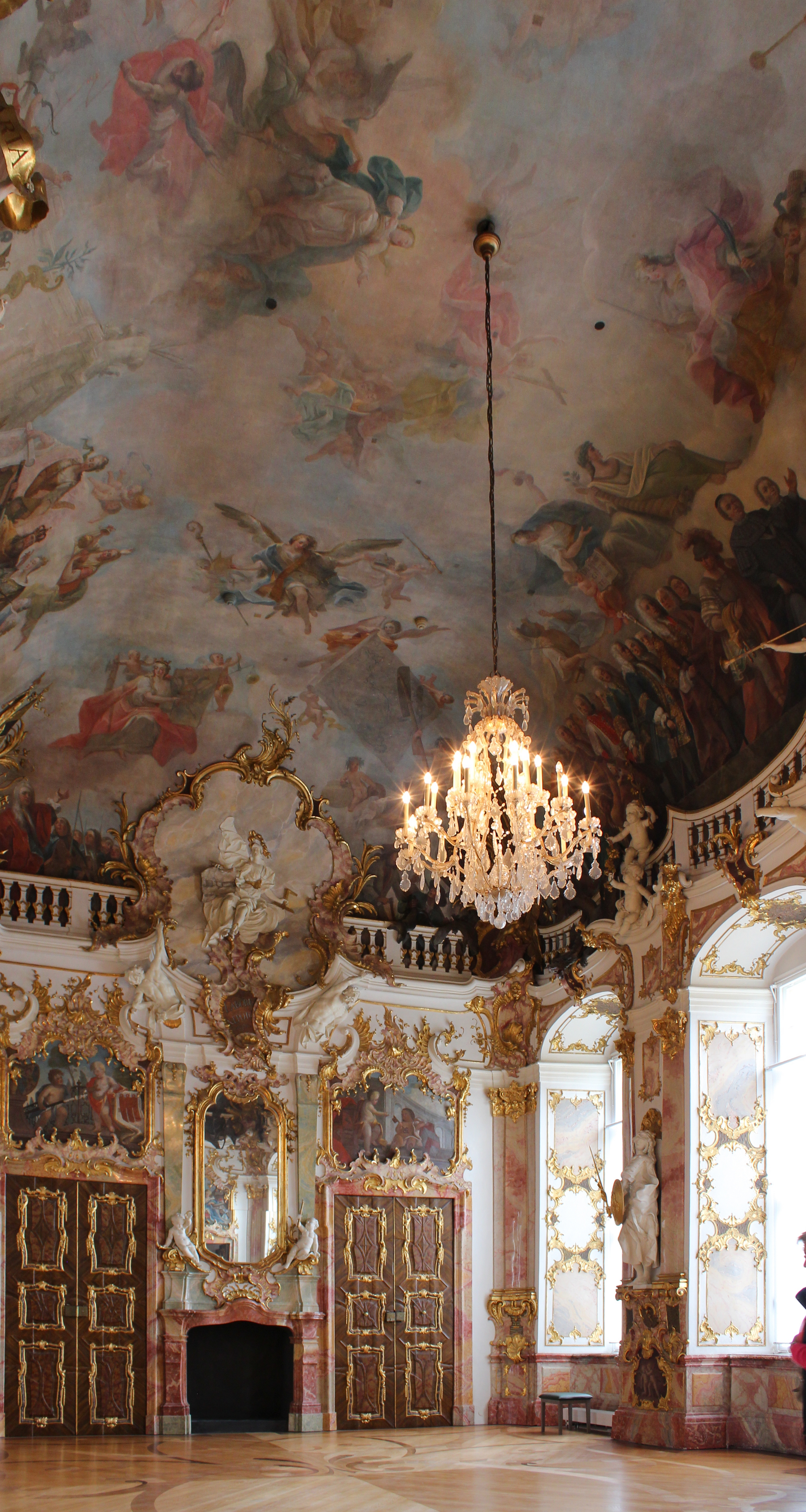 Thronsaal in der Fürstäbtlichen Residenz Kempten